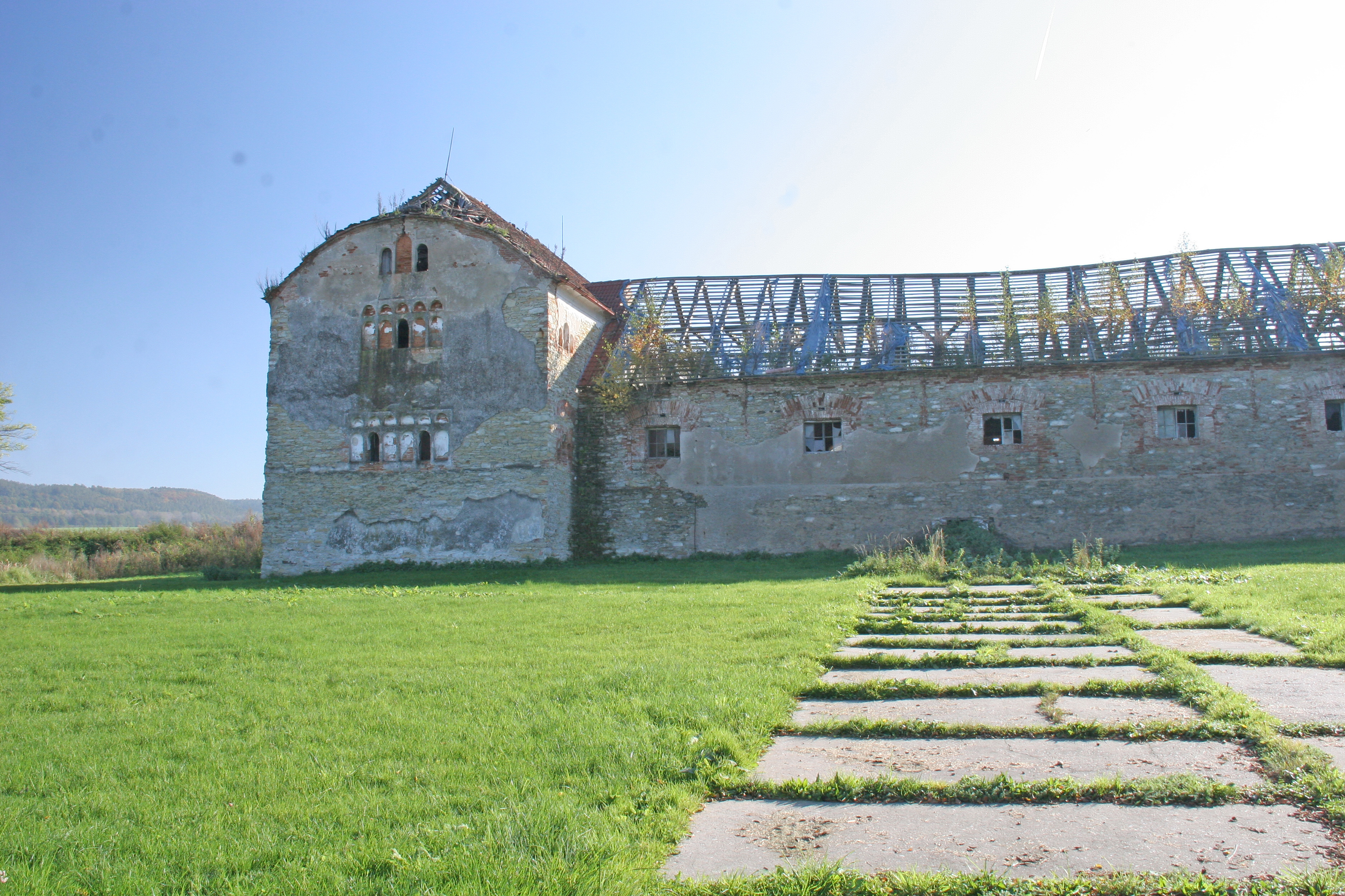 Lovčický dvůr